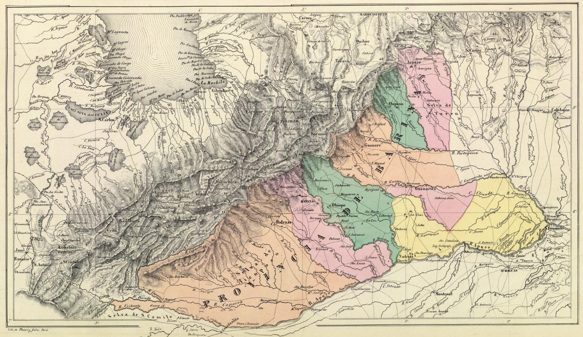 Provincia de Barinas. Tomado del "Atlas físico y político de la República de Venezuela", 1840.